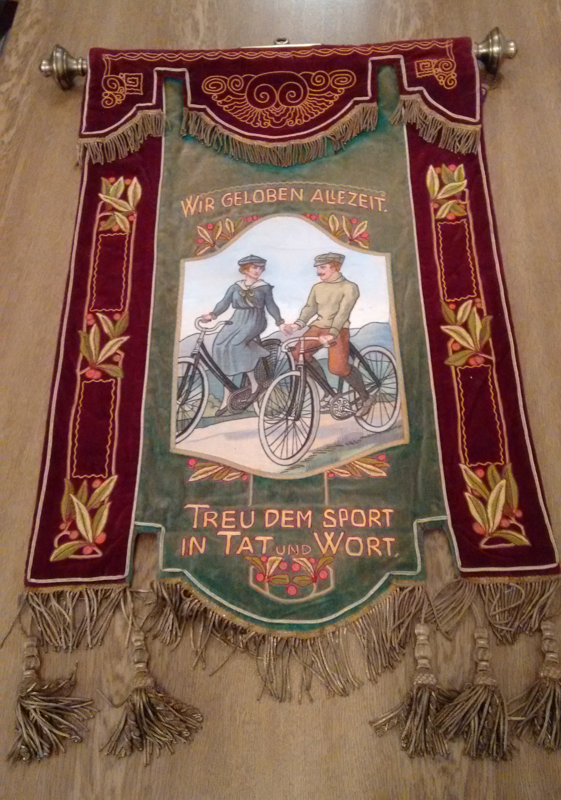 Ein Banner, der anlässlich des 20. Jubiläums des "Oberbadischen Radfahrer Bundes" (OBRB) allen Mitgliedsvereinen überreicht wurde, die bereits seit der Verbandsgründung 1904 dem OBRB angehörten. Das Bild zeigt die Rückseite des Banners.